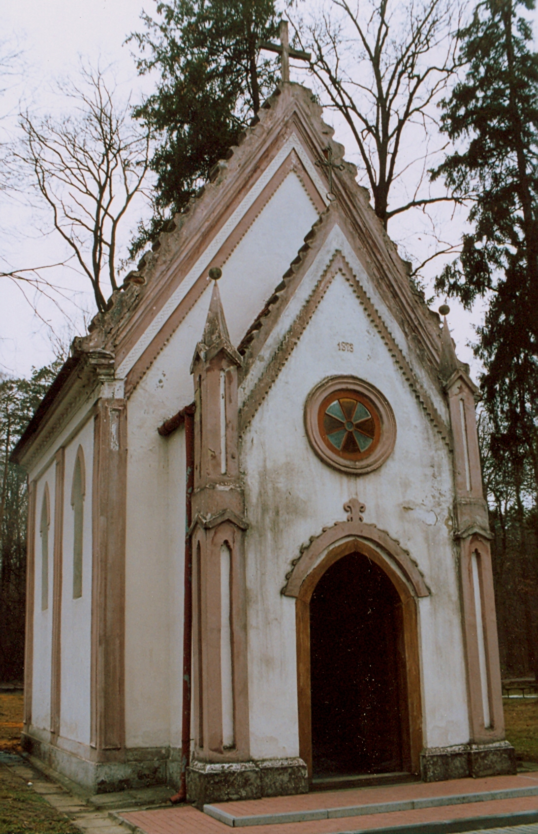 zespół pałacowy i folwarczny kaplica Werynia, Kolbuszowa 05.1975.